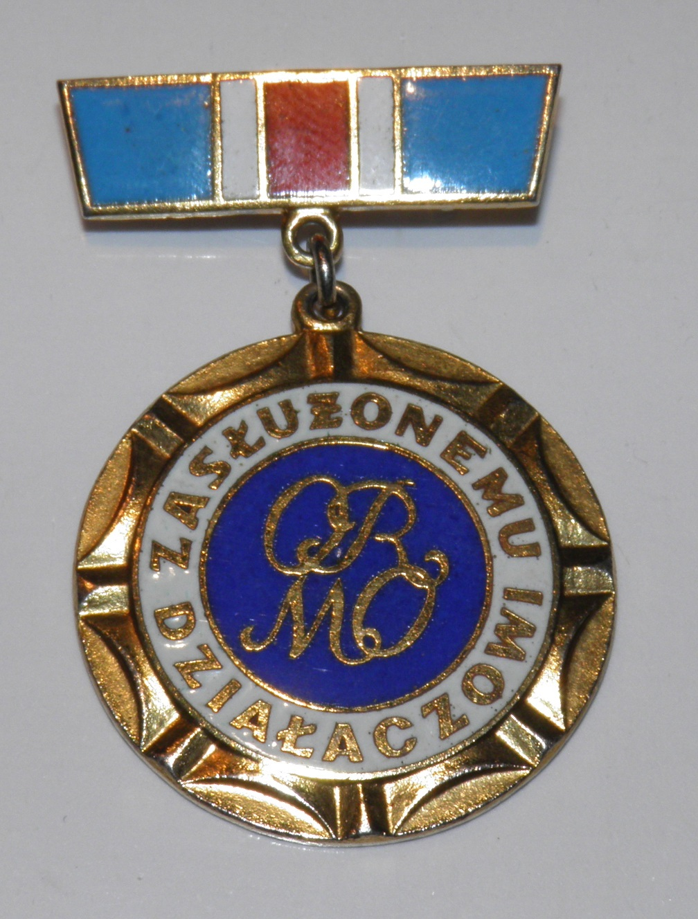 Odznaka Zasłużony Działacz ORMO 1wersja